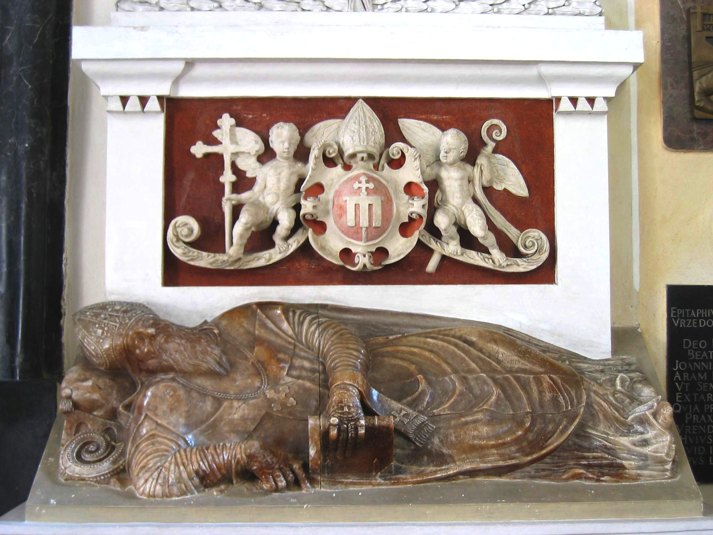 Jan Michałowicz z Urzędowa tomb effigy of Polish primate Jakub Uchański in Łowicz 1580 Image taken by user:Mathiasrex Maciej Szczepańczyk